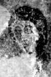 Rościsław